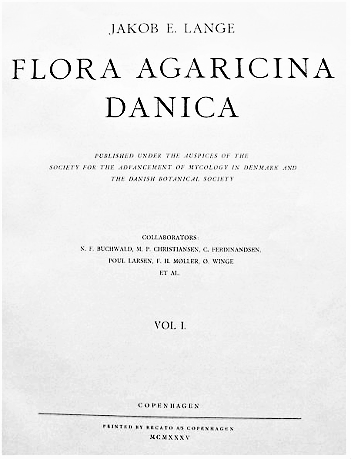 J. E. Lange: "Flora agarica danica", Band 1 Titelblatt